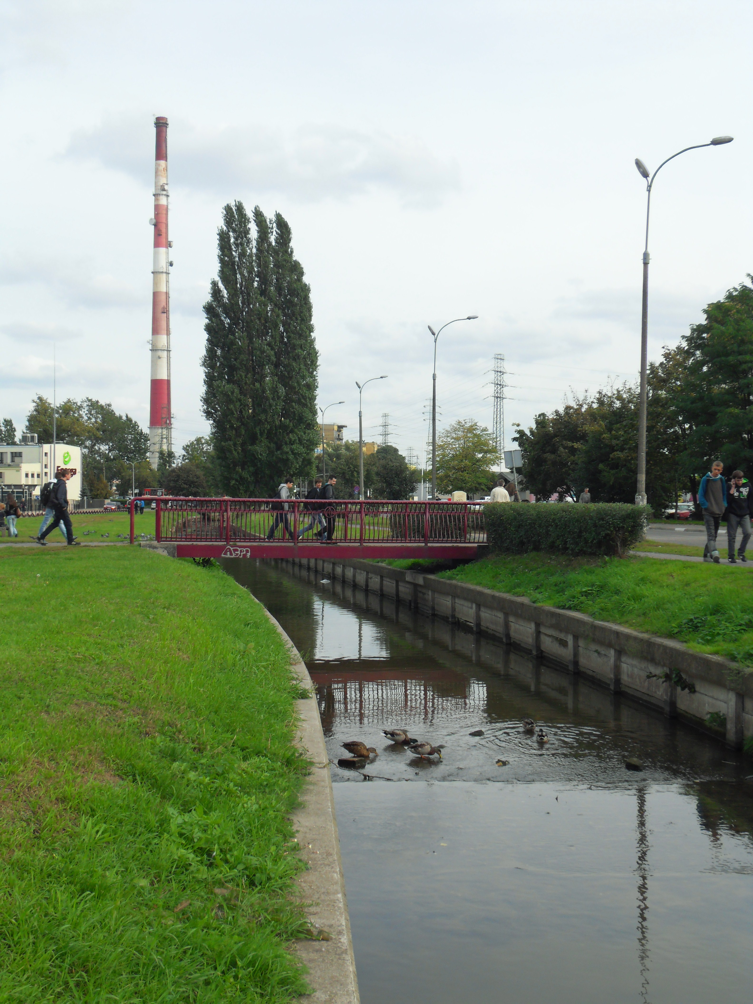 Gdańsk, potok Strzyża na granicy osiedli Letnica (po lewej) i Młyniska (po prawej). Komin EC II.